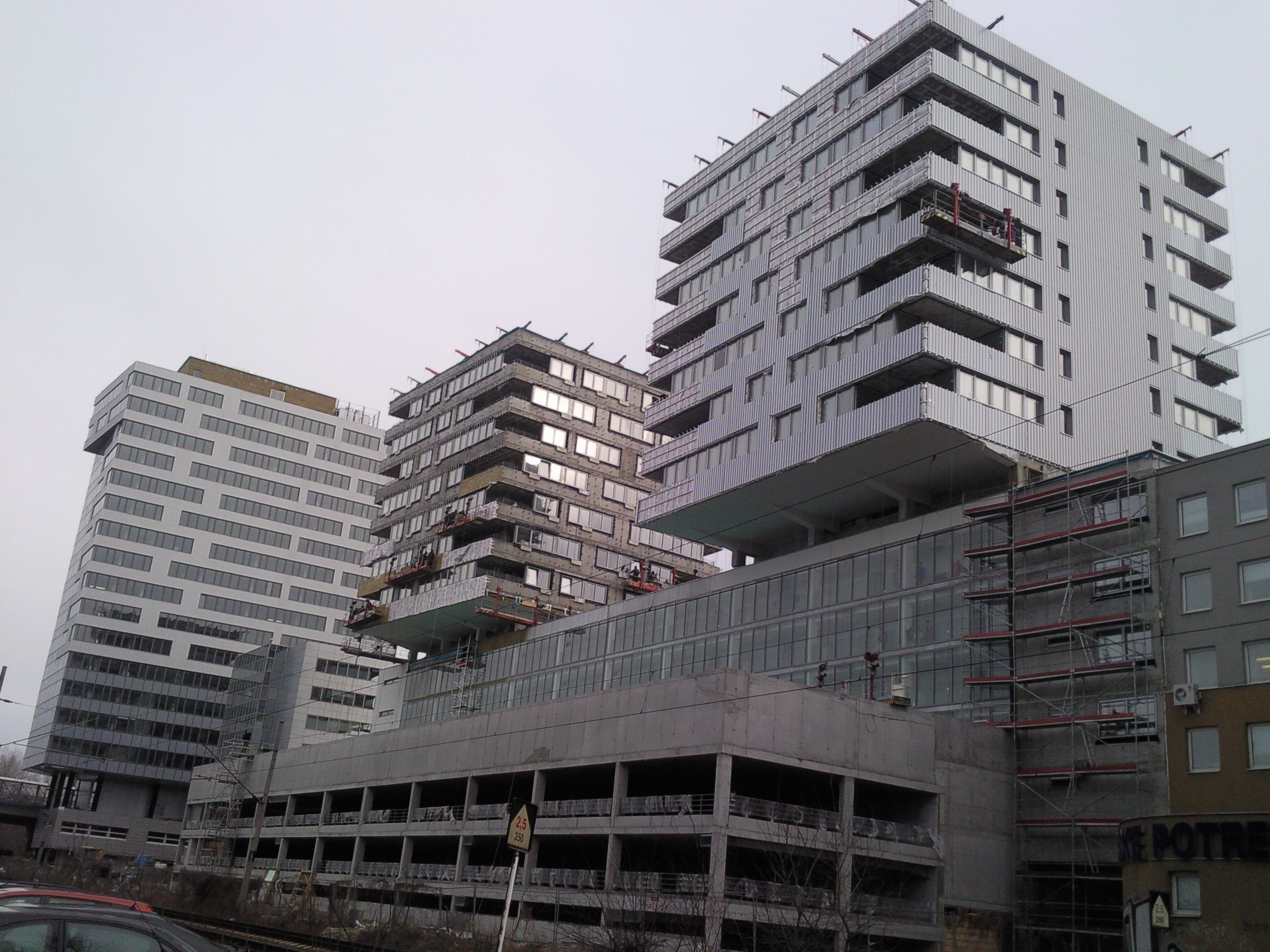 Tatra City, Bratislava, Slovakia